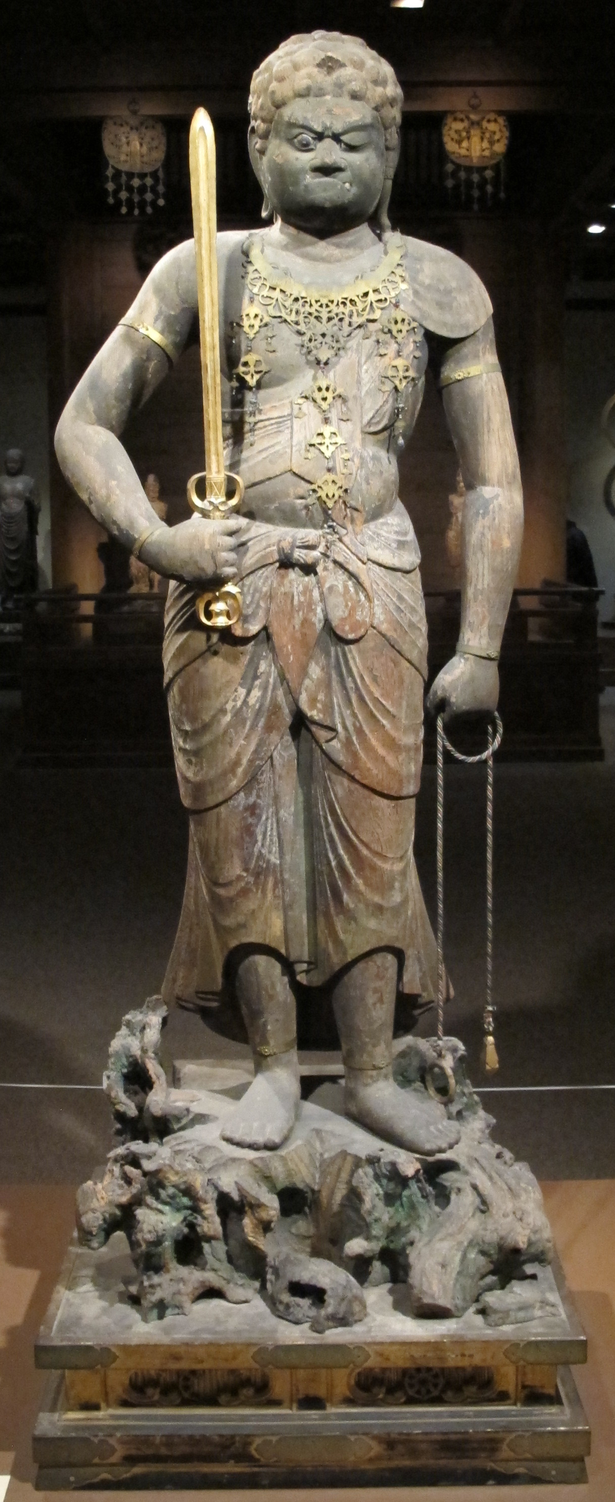 Metropolitan Museum